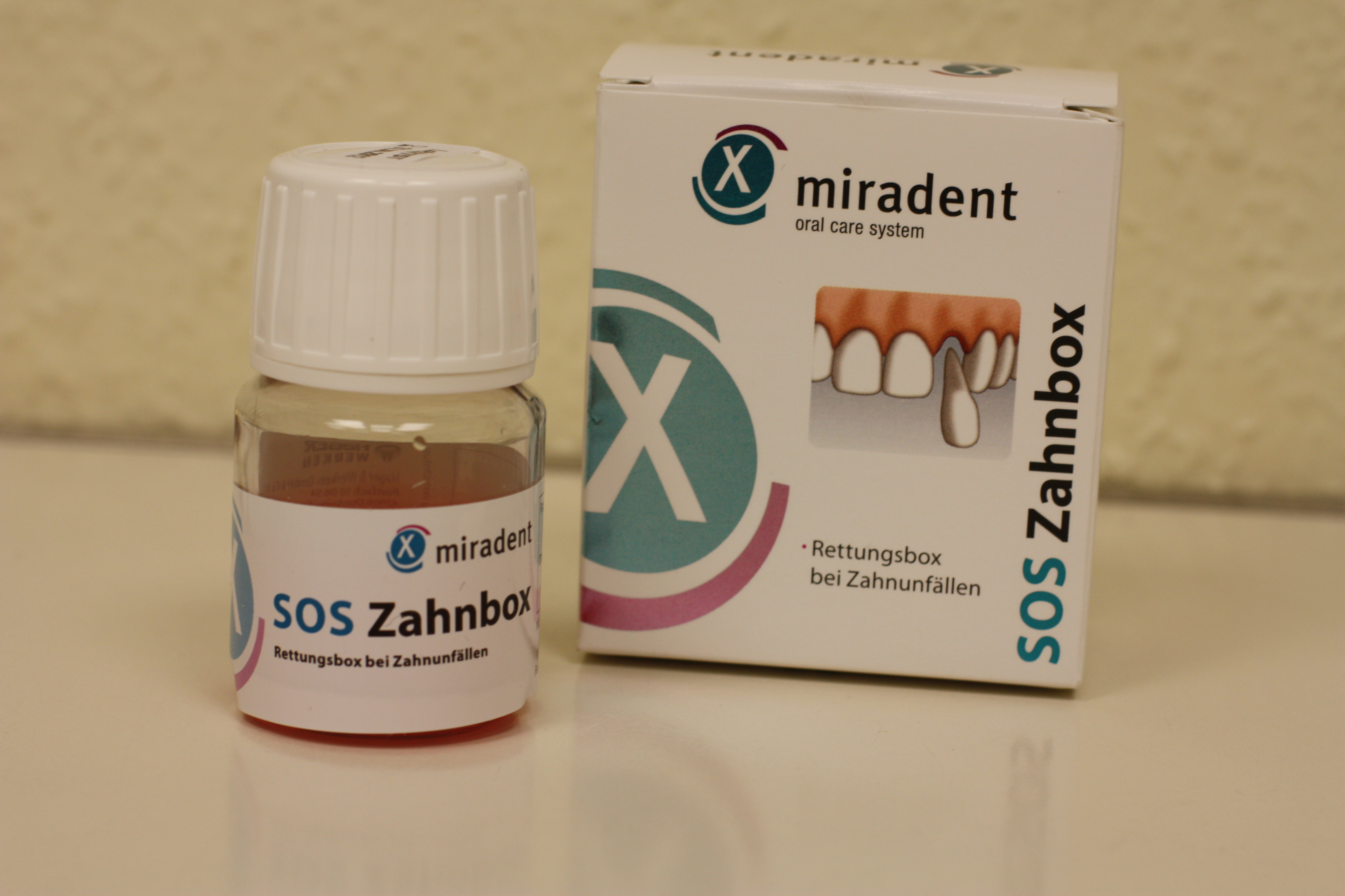 SOS Zahnbox, Fa.miradent, Zahnrettungsbox